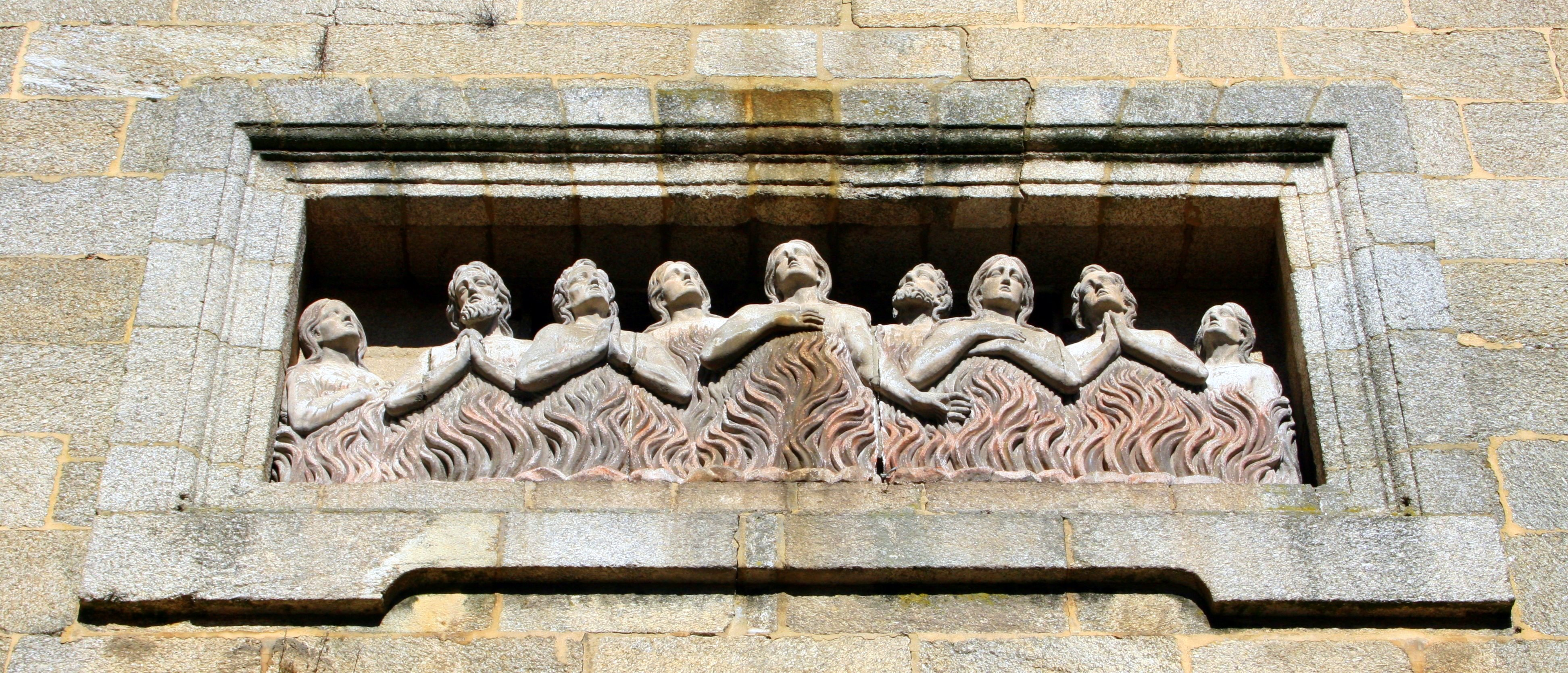 relevo da fachada da Capela das Ánimas, Santiago de Compostela Categoría:Imaxes da igrexa das Ánimas de Santiago de Compostela Categoría:Imaxes de relevos e baixorrelevos de Santiago de Compostela